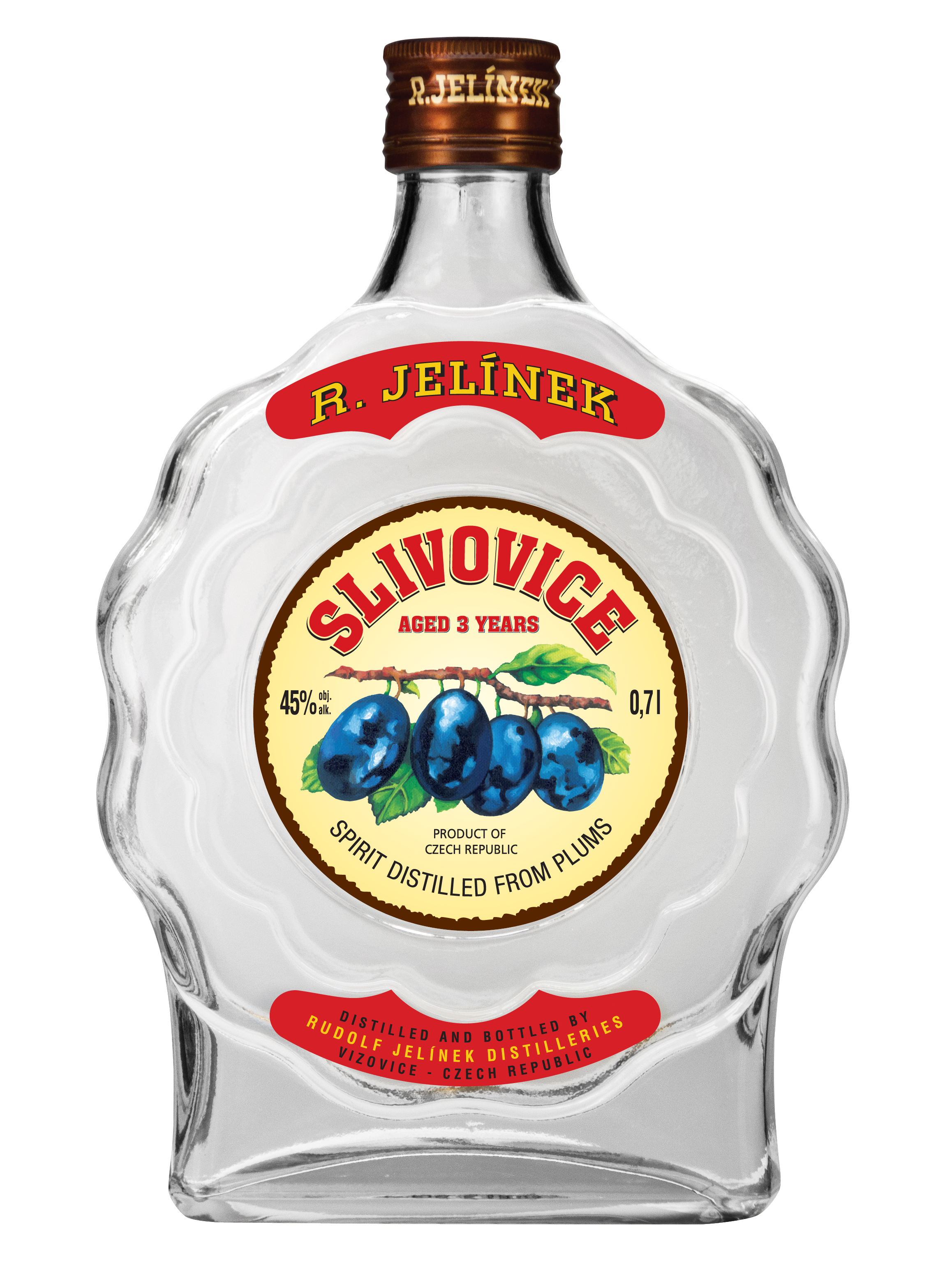 Slivovice R. JELÍNEK